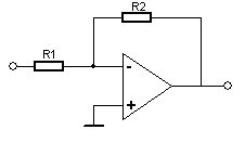 Invertierender Verstärker mit einem OP